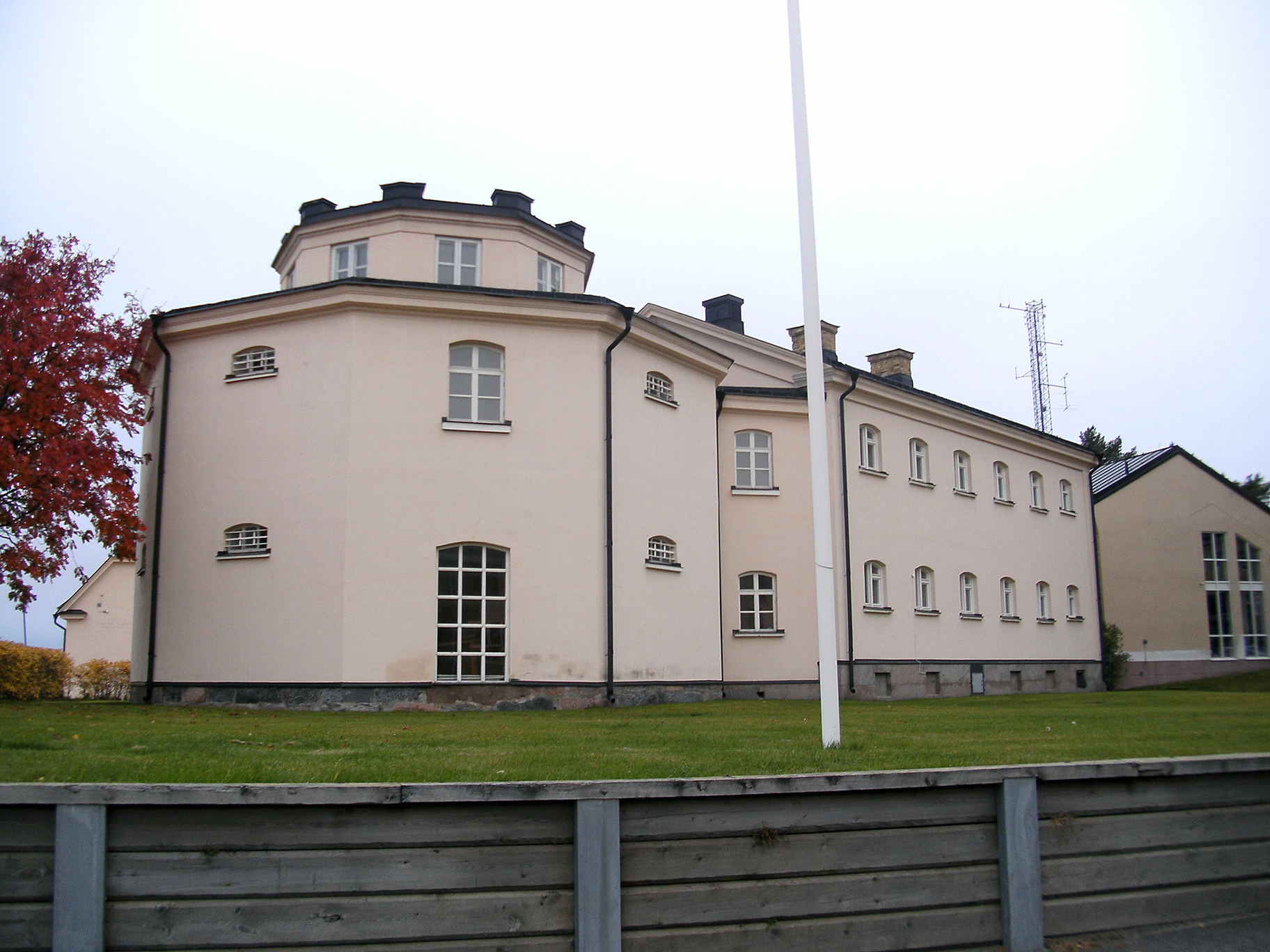 Gamla fängelset i Luleå